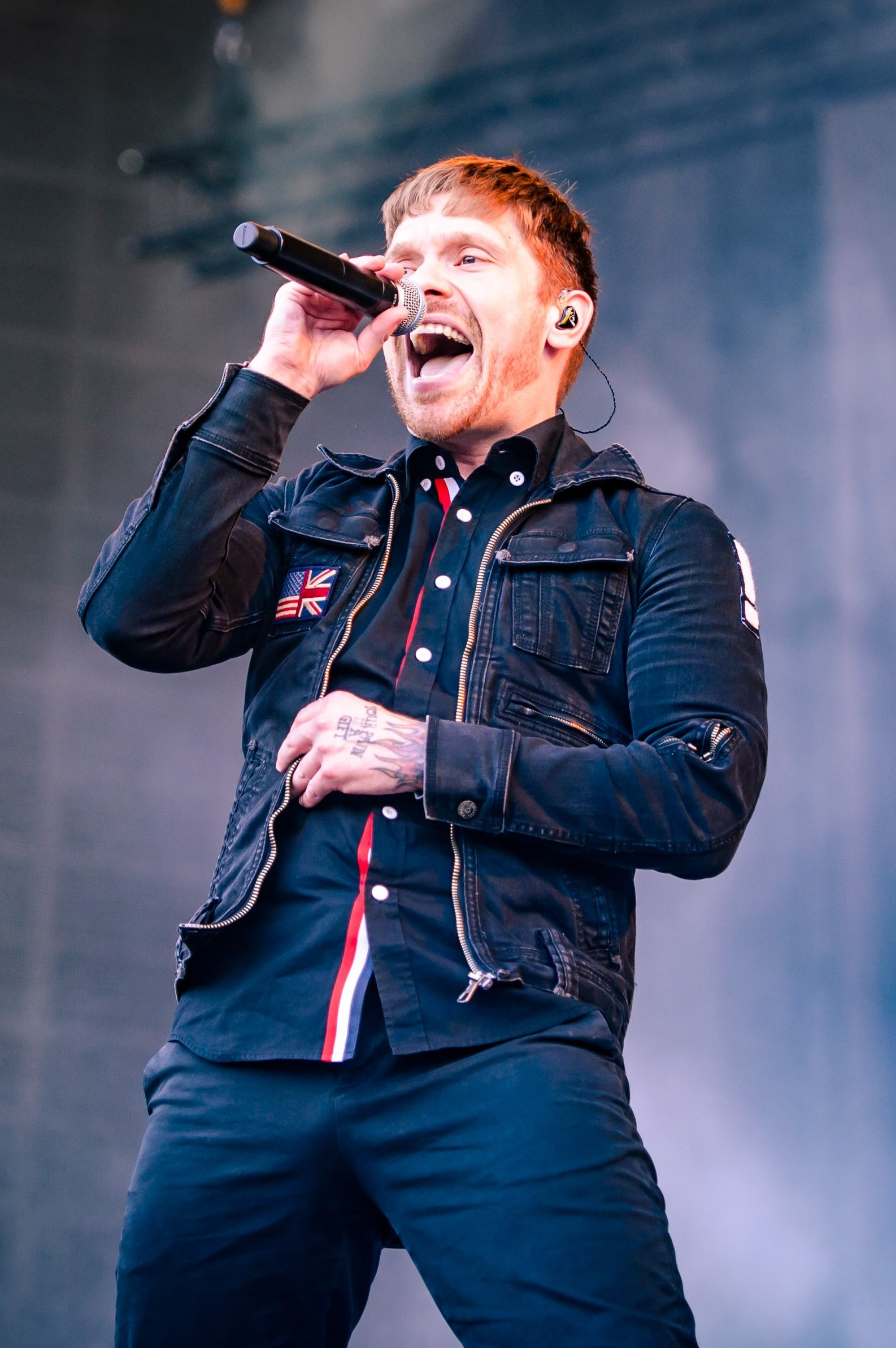 'Rock im Park 2018; Zeppelinfeld Nürnberg': 'Shinedown'